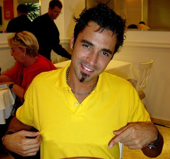 Brazilian singer Latino.